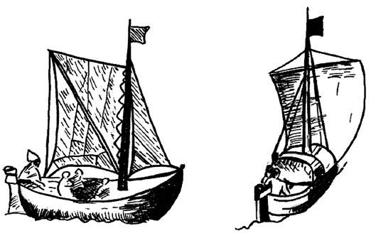 Рисунок малого коча из книги Яна Гюйгена ван Линсхотена (изд. 1611) из раздела, посвящённого участию в первой экспедиции В. Баренца (1594)